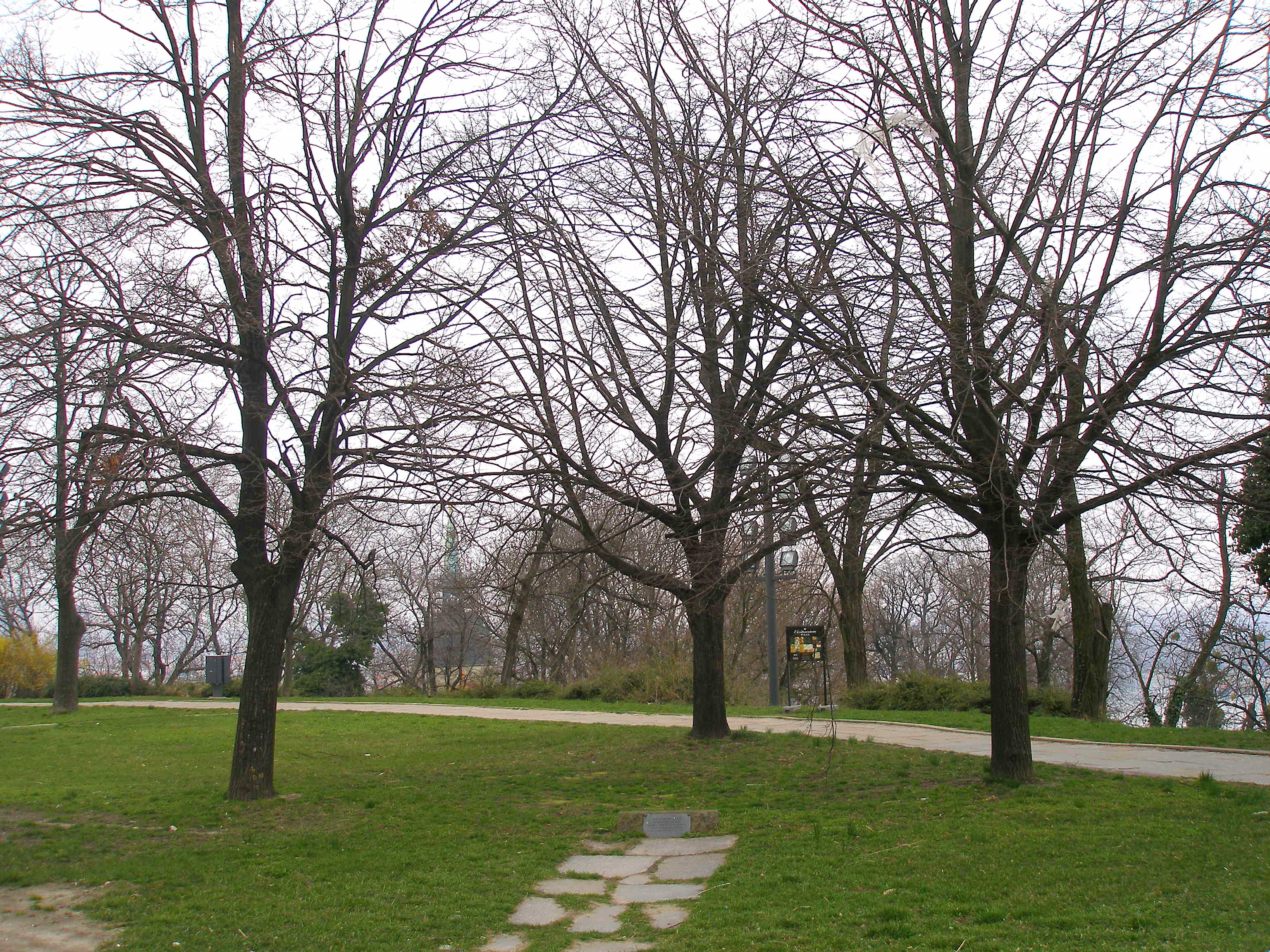 Bratislava hlavné mesto Slovenskej republiky. Hrad.Tri lipy československej federácie.